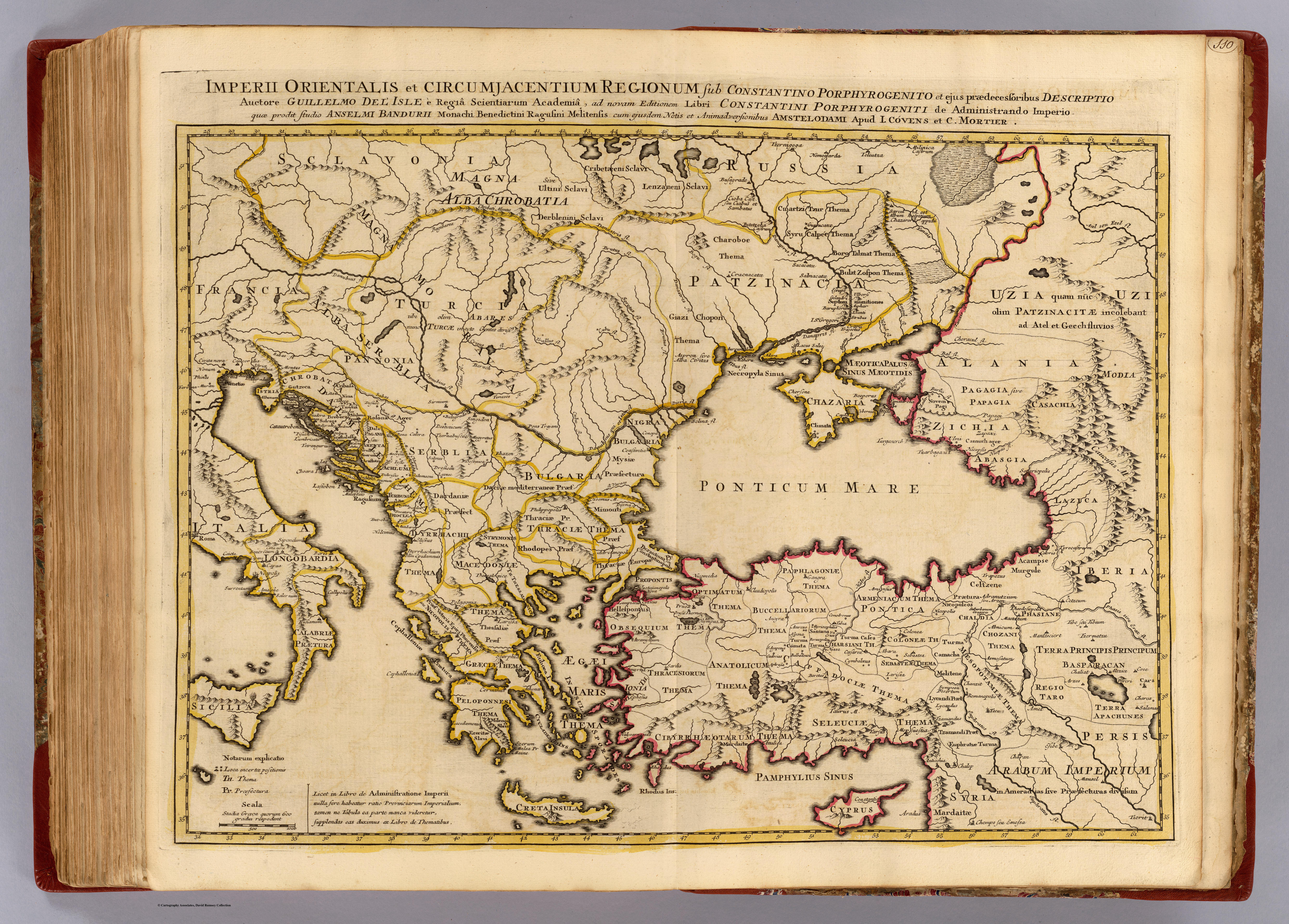 Imperii Orientalis et Circumjacentium Regionum, sub Constantino Porphyrogenito et ejus praedecessoribus descriptio. Auctore Guillelmo de l'Isle e Regia Scientiarum Academia, ad novam editionem Libri Constantini Porphyrogeniti de Administrando Imperio quae prodit studio Anselmi Bandurii, Monachi Benedictini Ragusini Melitensis cum ejus dem note et animadversionibus. Amstelodami, apud I. Covens et C. Mortier. (1742).